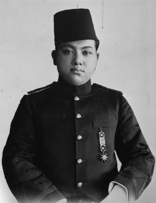 Foto. Als blijk voor het meeleven en welslagen v. Onze School (Ondertekend door de sultan; handtekening niet leesbaar) 19/5-18. Sultan van Siak